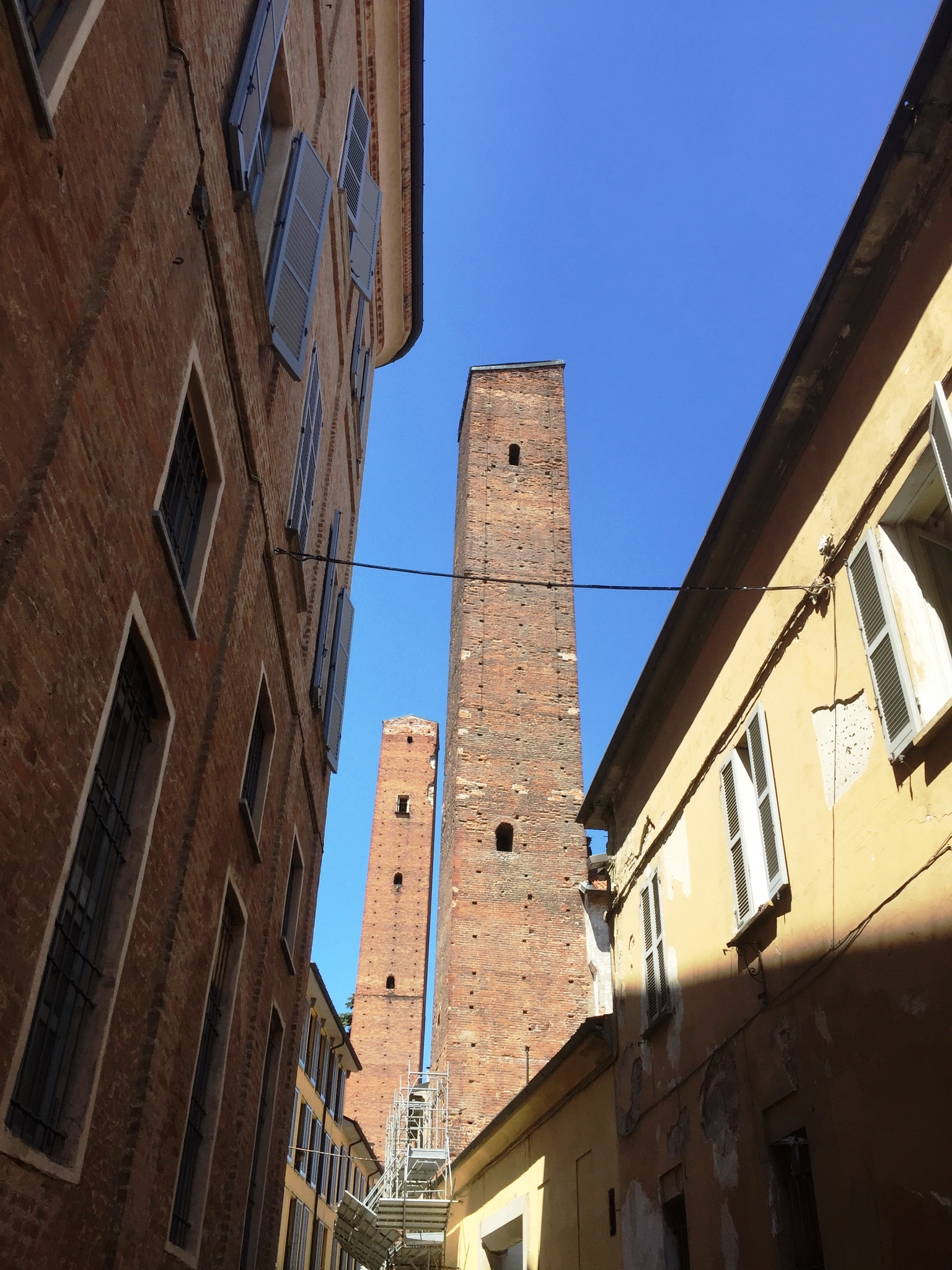 Alcune delle torri medievali ancora presenti in città